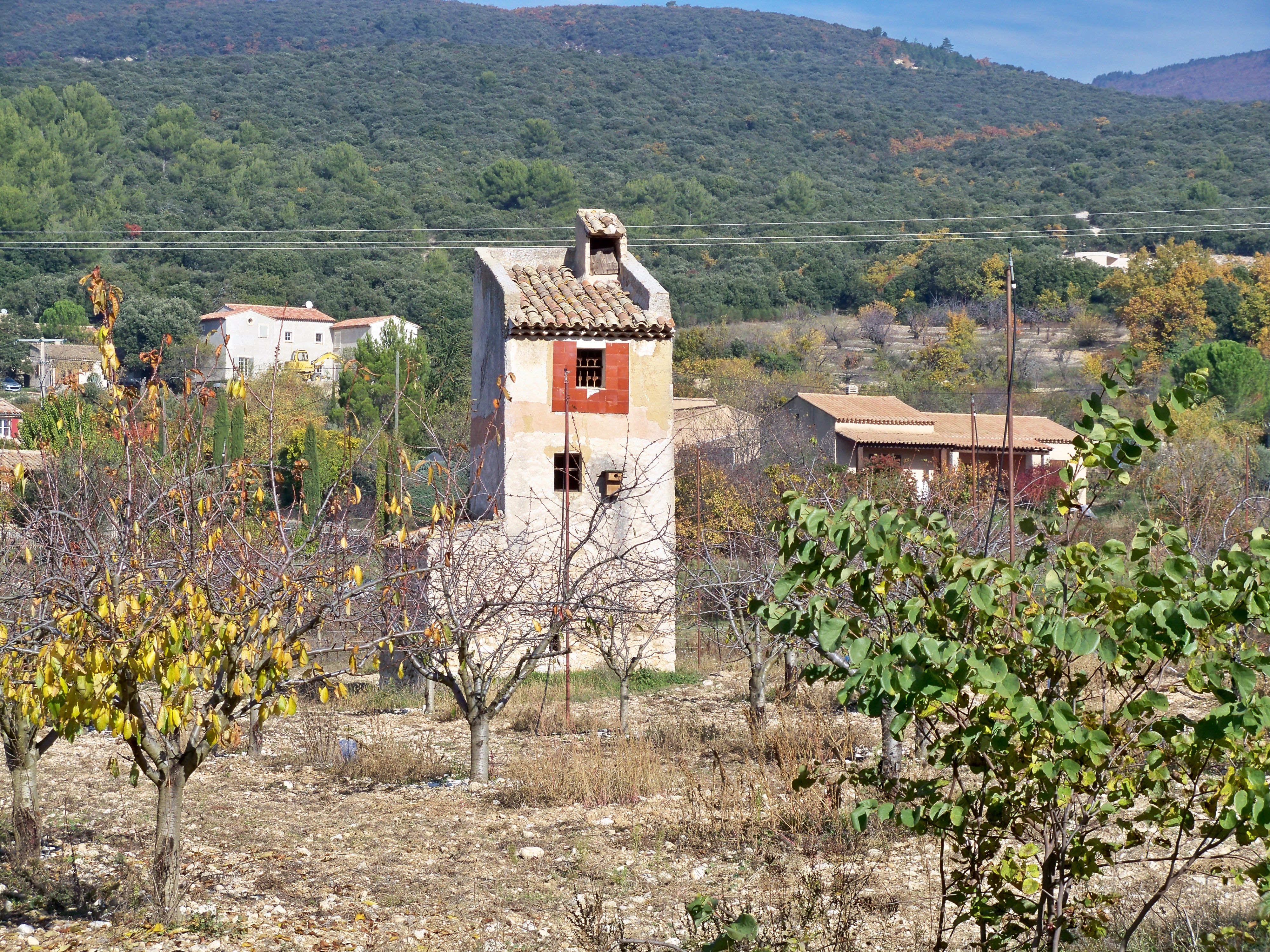 Pigeonnier à Grand Clément, Vaucluse, France